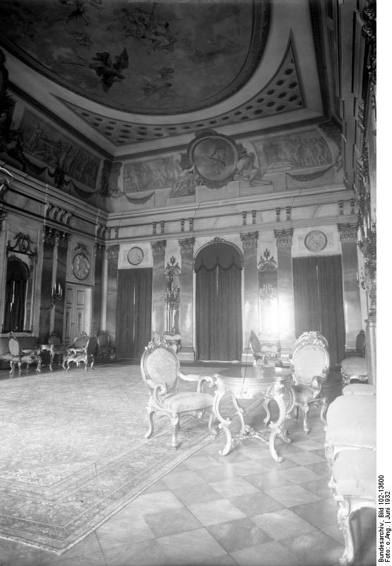 Wo lebt und schafft der deutsche Reichspräsident ! Das Reichspräsidenten-Palais in der Wilhelmstrasse 73 wurde 1839, für den Landjägermeister von Schwerin erbaut. Nach wechselvollem Schicksal ging es 1845 in den Besitz Friedrich Wilhelm IV. über. Bis 1871 war es der Sitz des Gouverneurs von Berlin. Von da an bis zum Jahre 1918 beherbergte es das königl. Hausministerium. Es besteht aus einem Wohnflügel und zwei einem Vorhof begrenzenden Seitenflügeln. Das erste Stockwerk enthält die Gesellschaftsräume und die Privaträume. Das Arbeitszimmer des Reichspräsidenten liegt im Erdgeschoss nach der Gartenseite hinaus. Der grosse Repräsentationssal, in welchem die Empfänge bei grossen Festlichkeiten stattfinden.